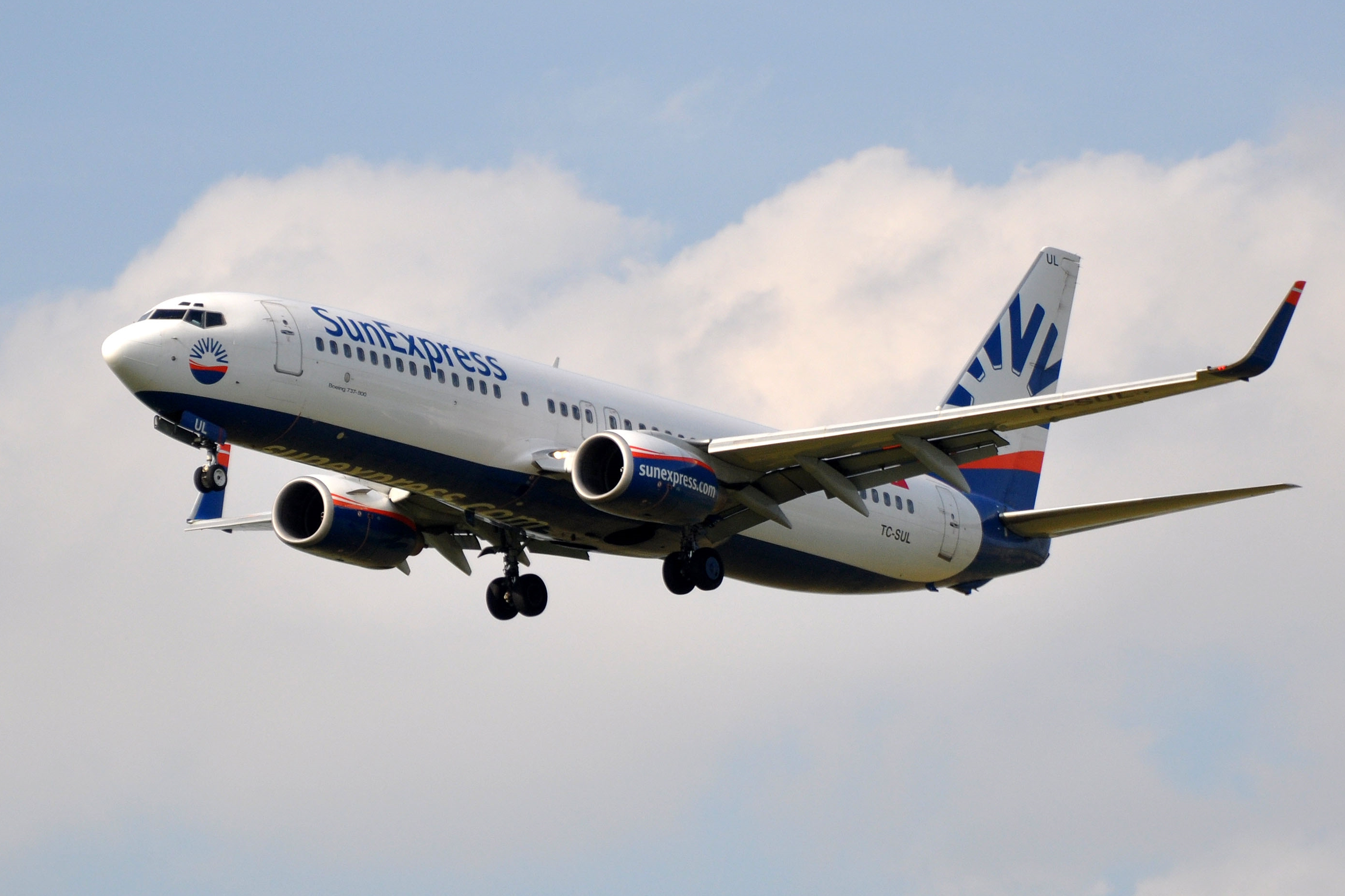 MSN 28822 LN 166 B737-85F SUN EXPRESS CDG AIRPORT EX NOVAIR AS SE-DVO